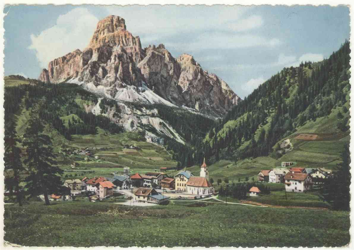 BZ Corvara in Badia m.1558 Dolomiti